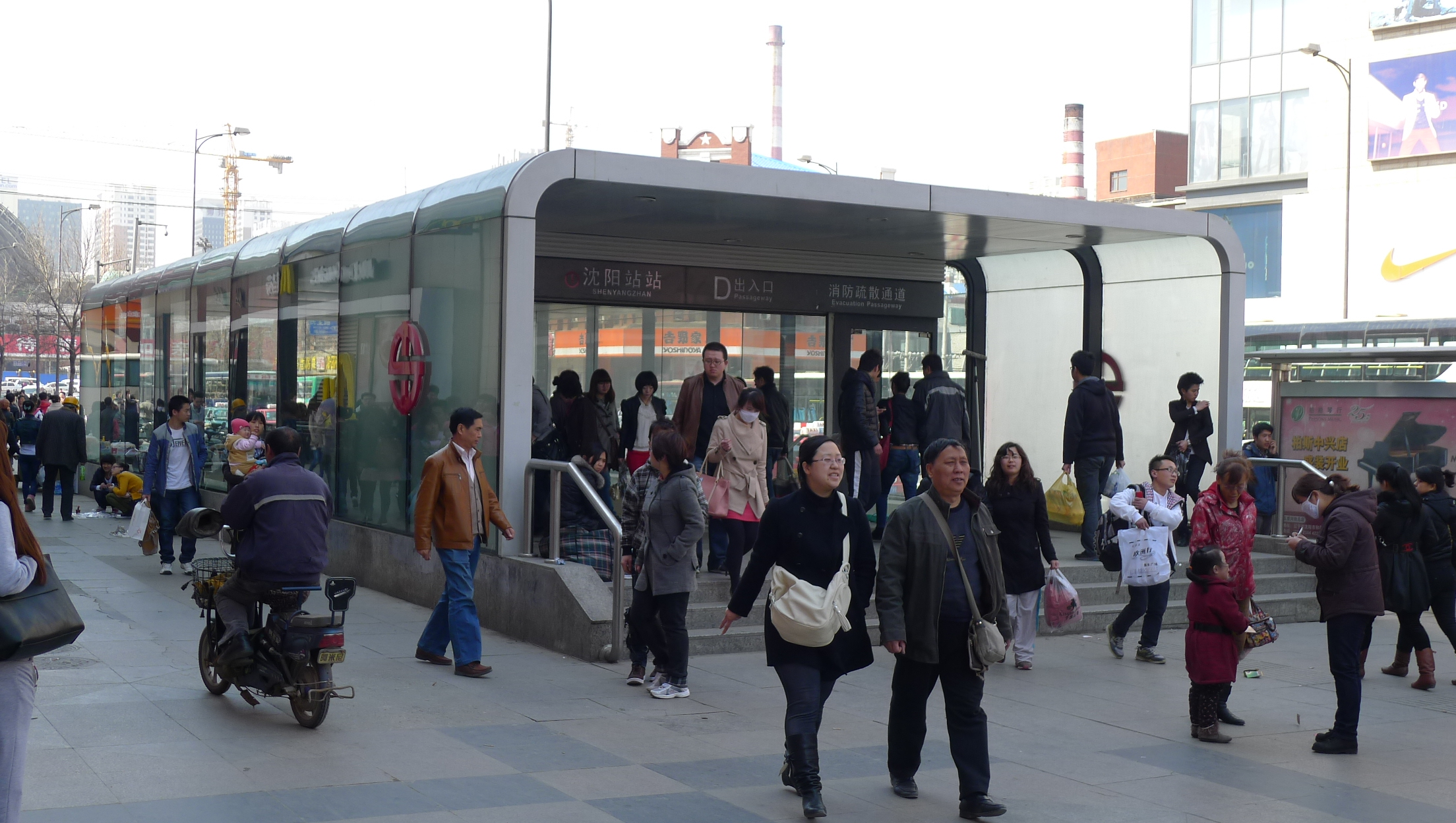 沈阳地铁一号线沈阳站站D出入口